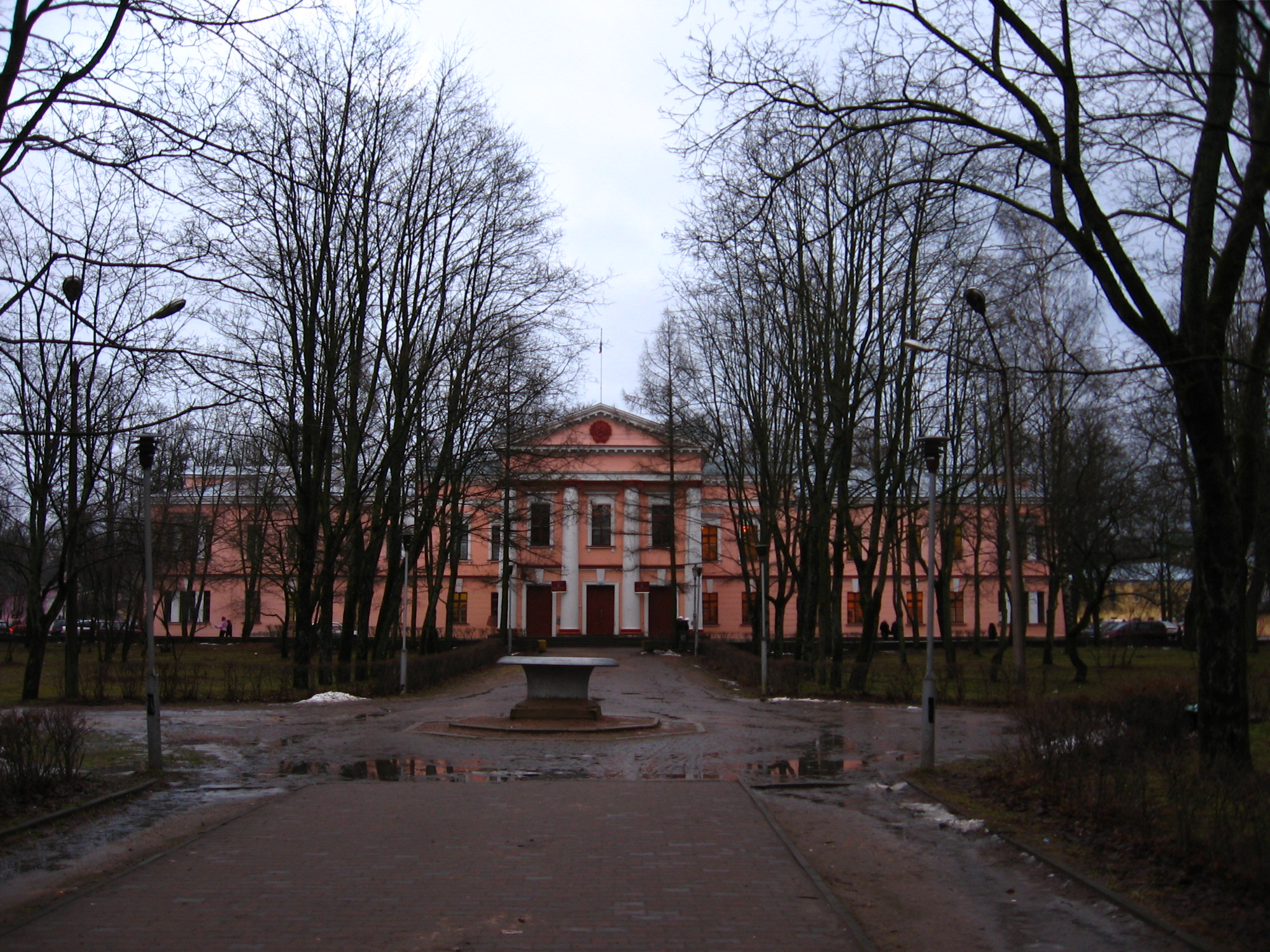 Здание администрации города Гатчина. Бывший городской госпиталь. Здание построено в 1822 году, архитектор А. Е. Штауберт.